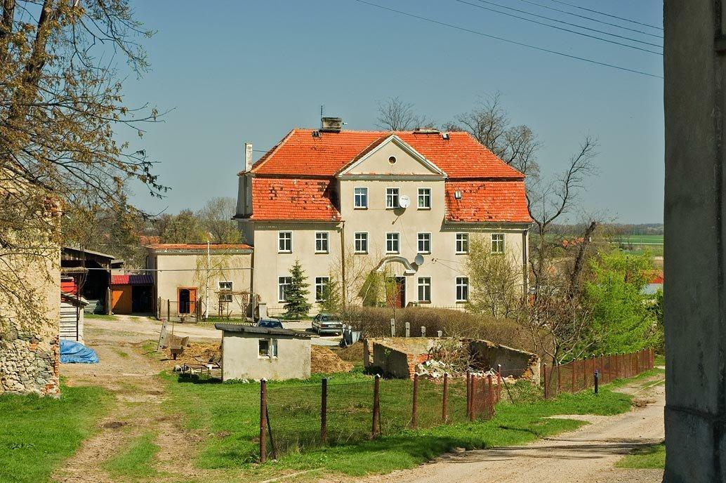 Dwór w Janówku od frontu.